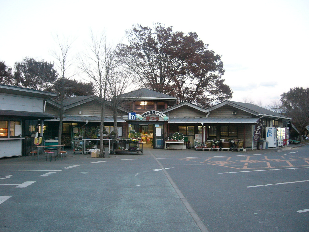 Michinoeki Katsura (Ibaraki) (道の駅かつら)